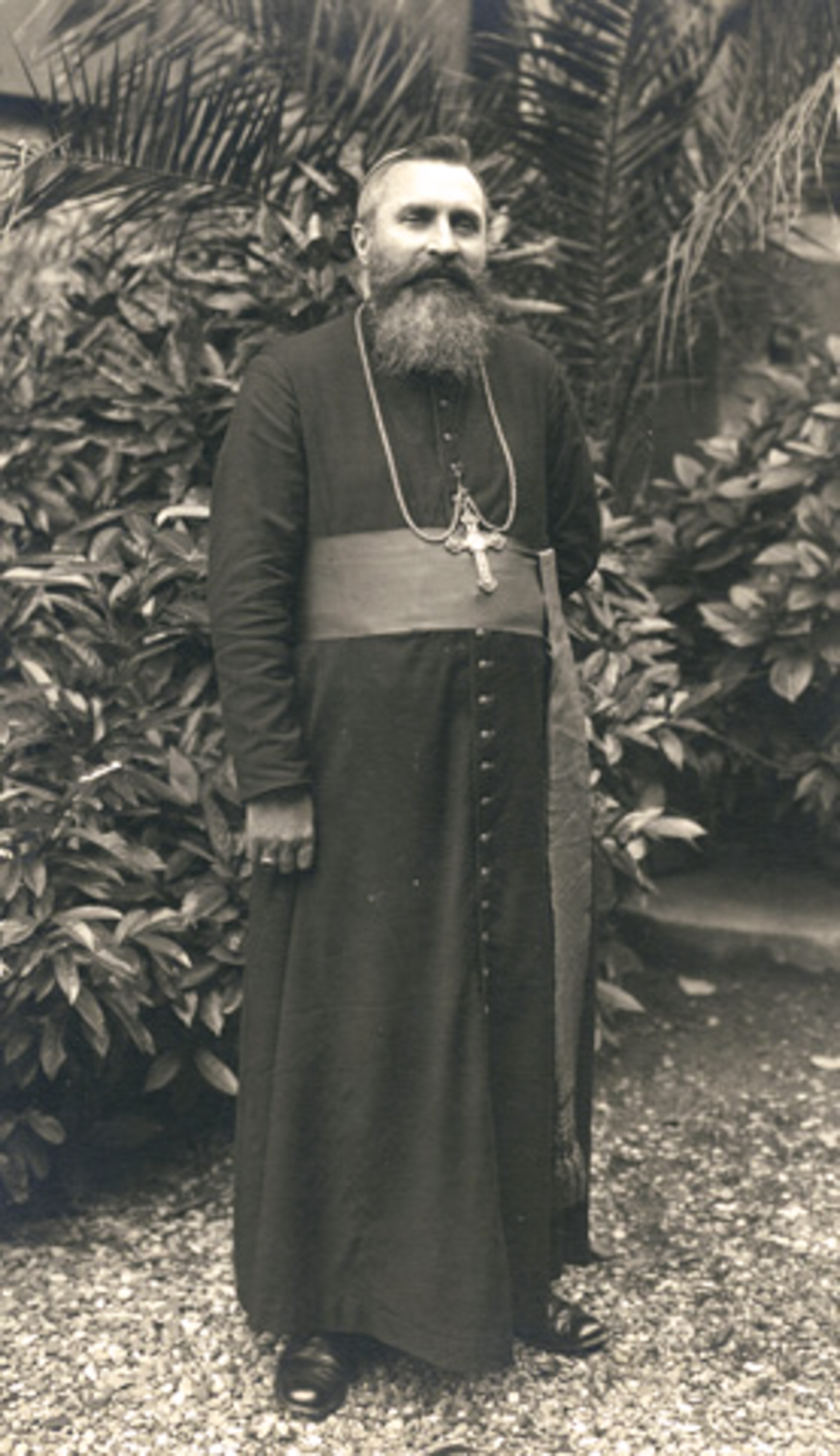 Ernest Hauger, né le 5 octobre 1873 à Kingersheim en Alsace (alors province de l'Empire allemand) et mort le 12 octobre 1948, est un missionnaire alsacien qui fut vicaire apostolique en Côte d'Or (aujourd'hui Ghana) et donc l'un des pionniers de l'Église catholique dans ces régions.